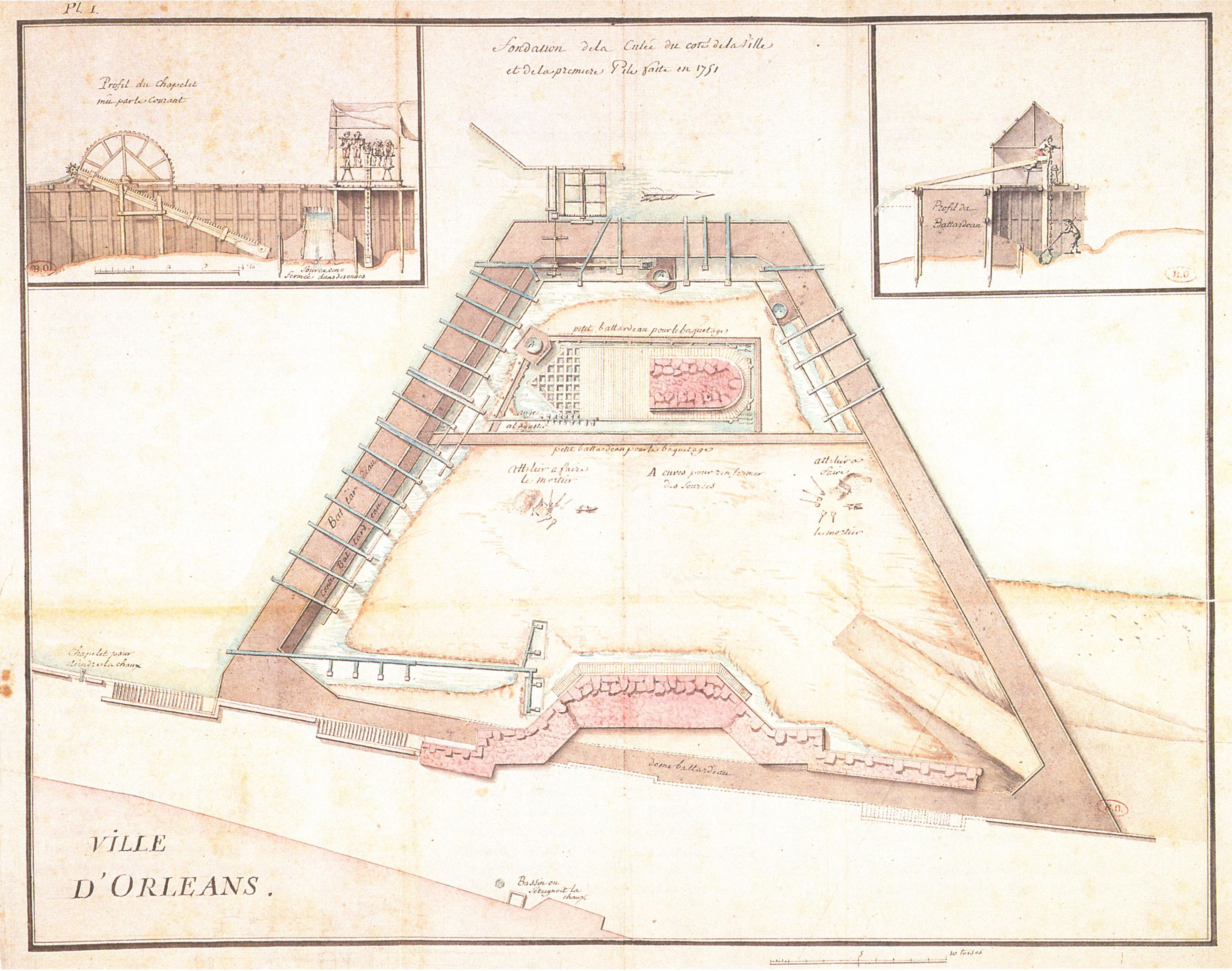 Pont George V, pile en construction en 1751, Orléans, Loiret, France